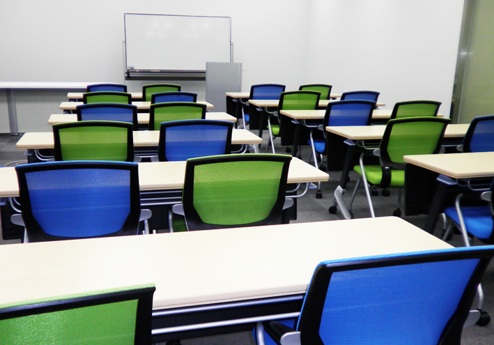 塾SiN教室